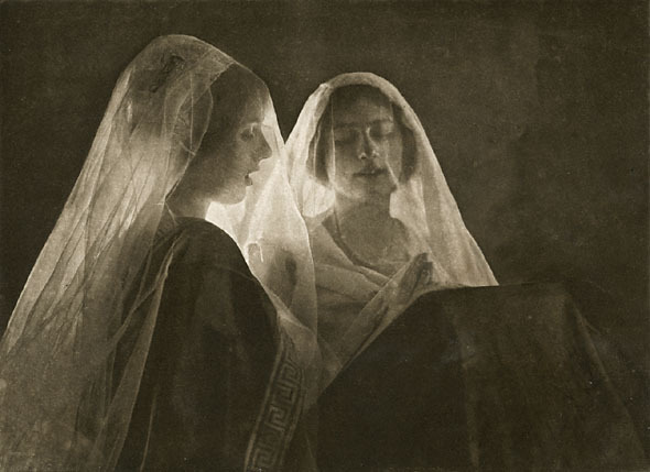 Constant Puyo: Women in Veils, 1900s